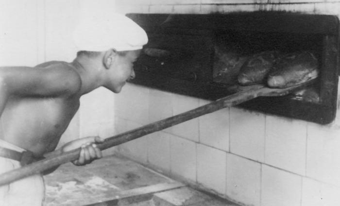 גן-שמואל - דוד גרף מוציא לחם אפוי מהתנור.